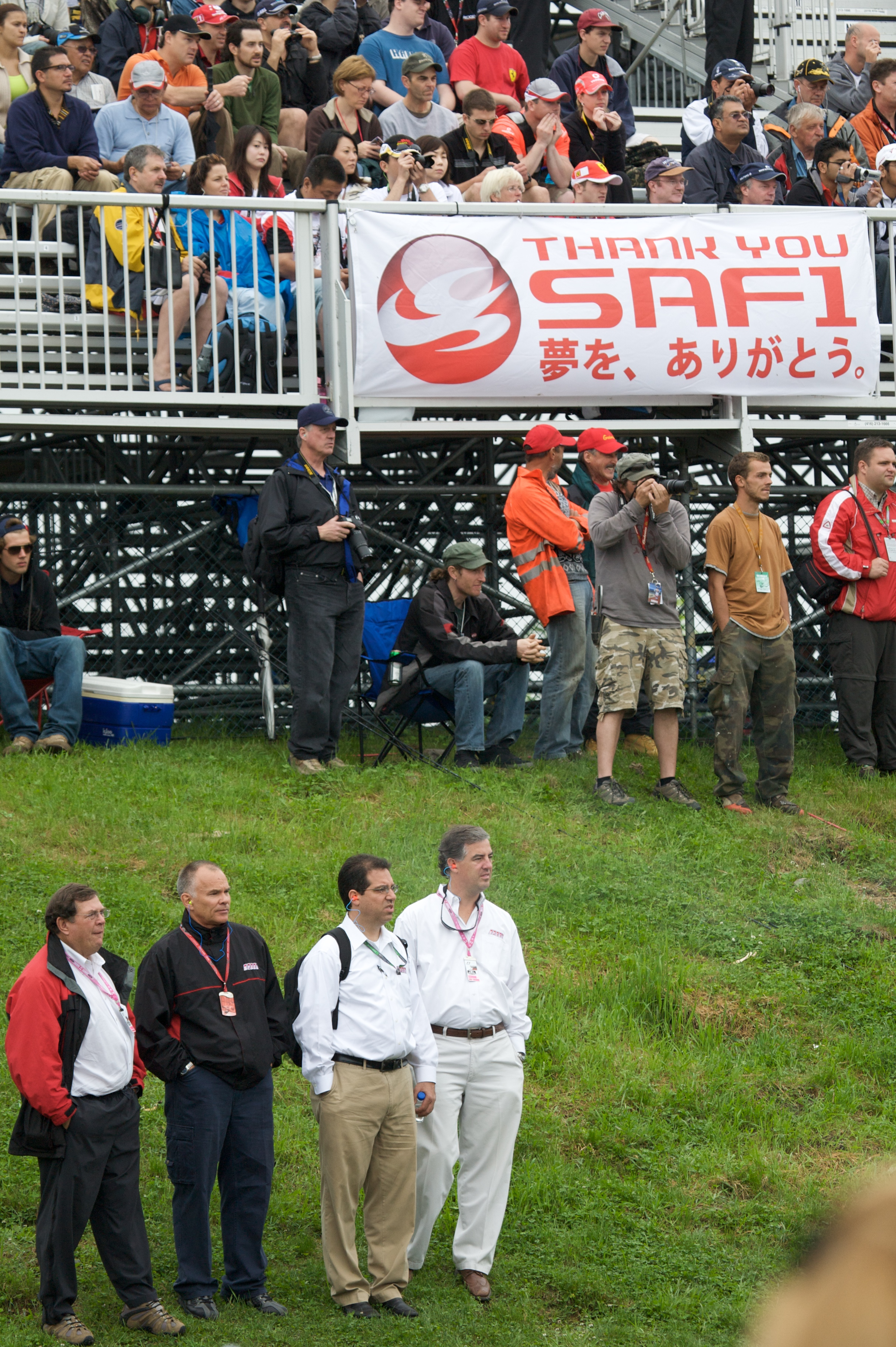 message de soutien de fans après l'arrêt de Super Aguri en Formule 1